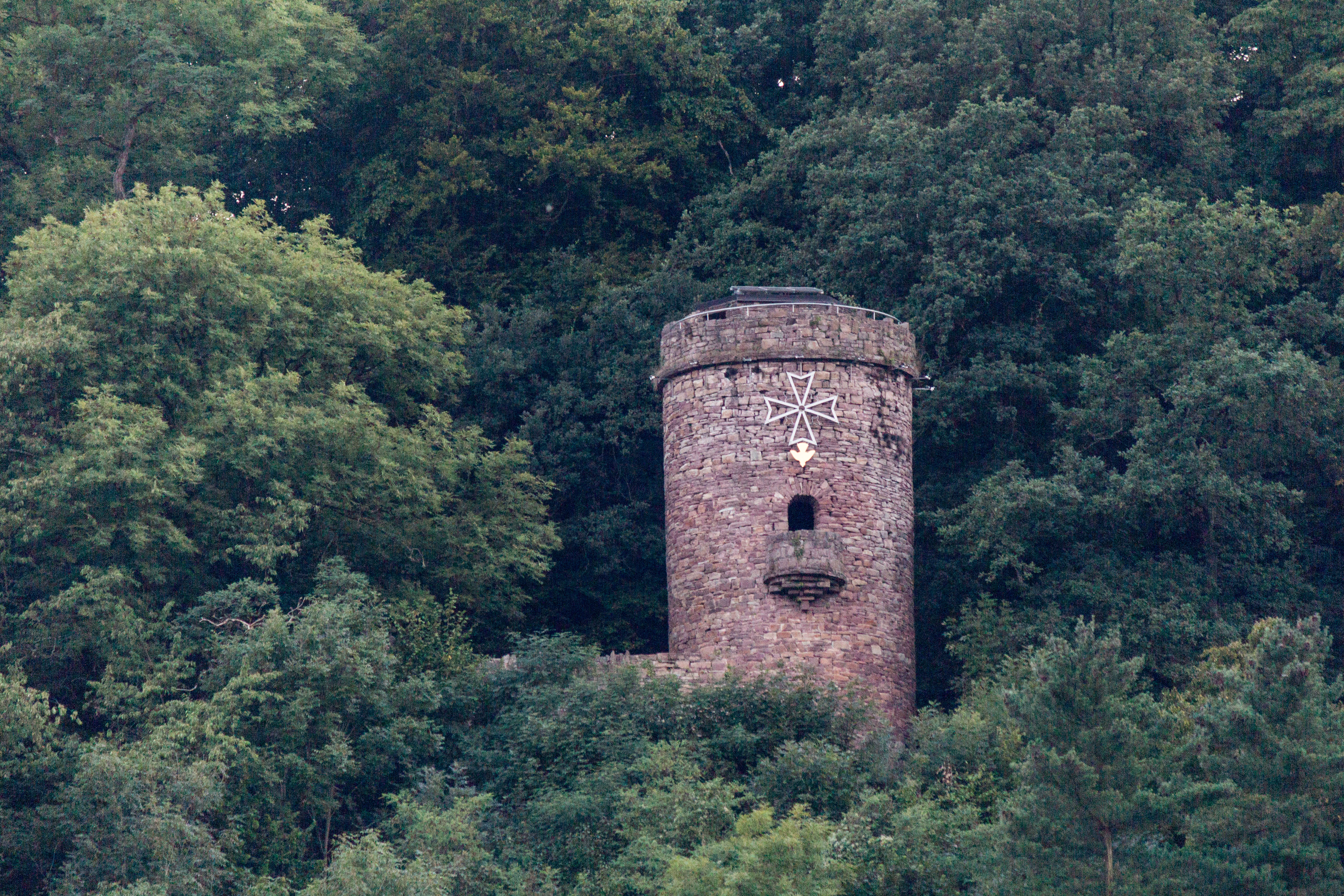 Hugenottenturm_(Bad_Karlshafen)